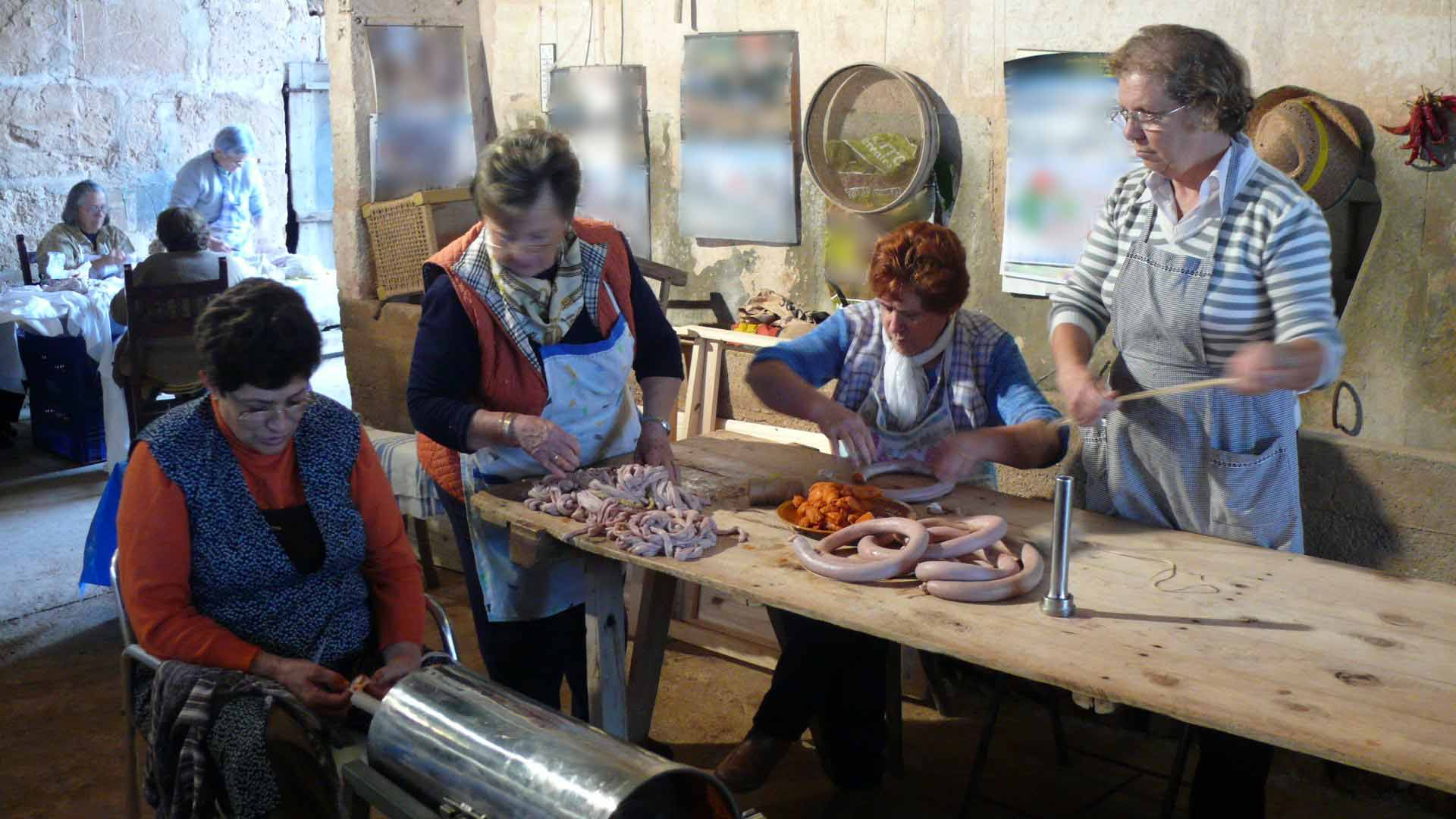 Dones posant la sobrassada dins els budells del porc.